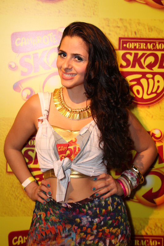 A ex-participante do reality show The Voice Brasil, Mira Callado.